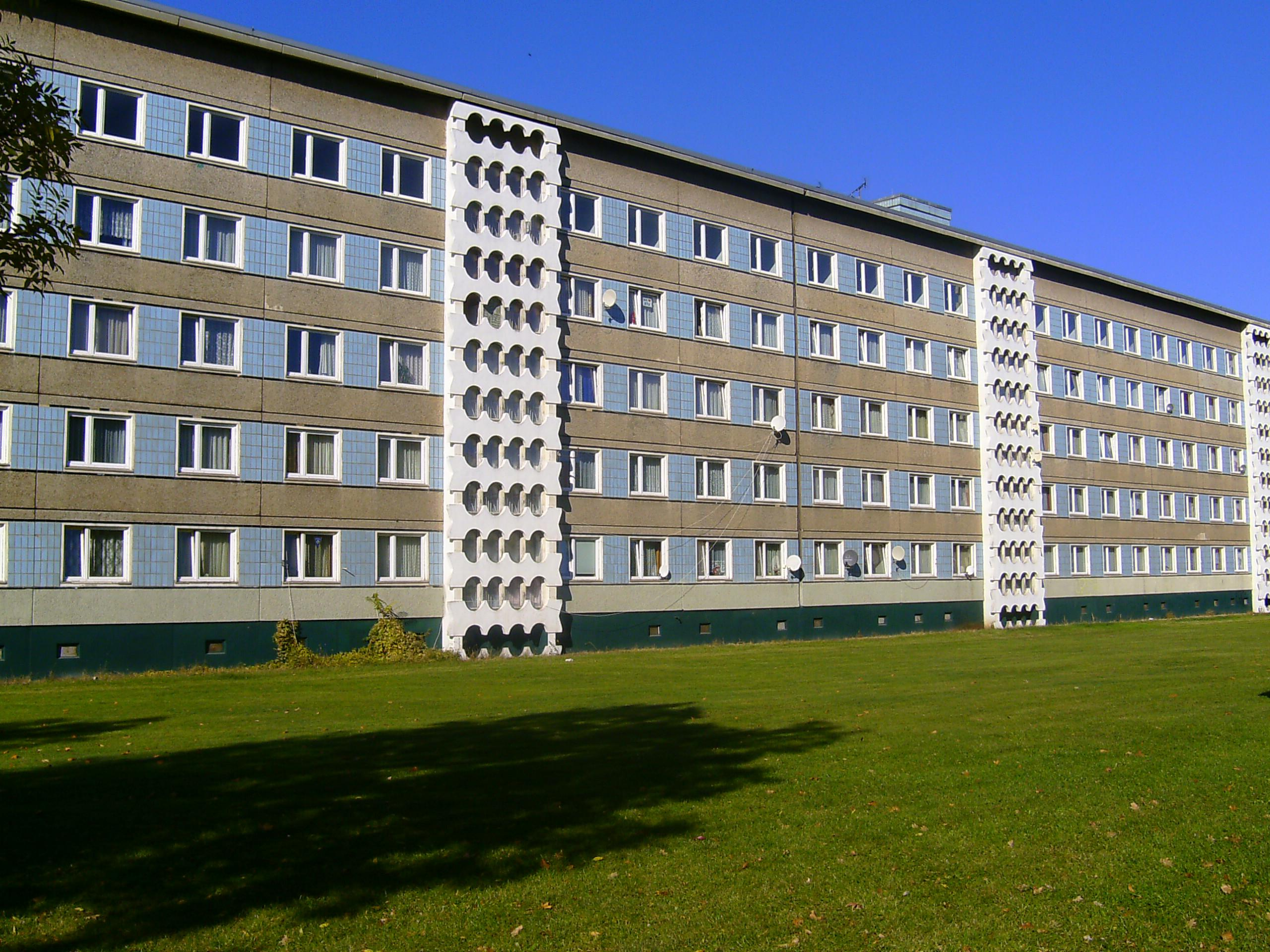 Wohnanlage in der Nähe der BTU